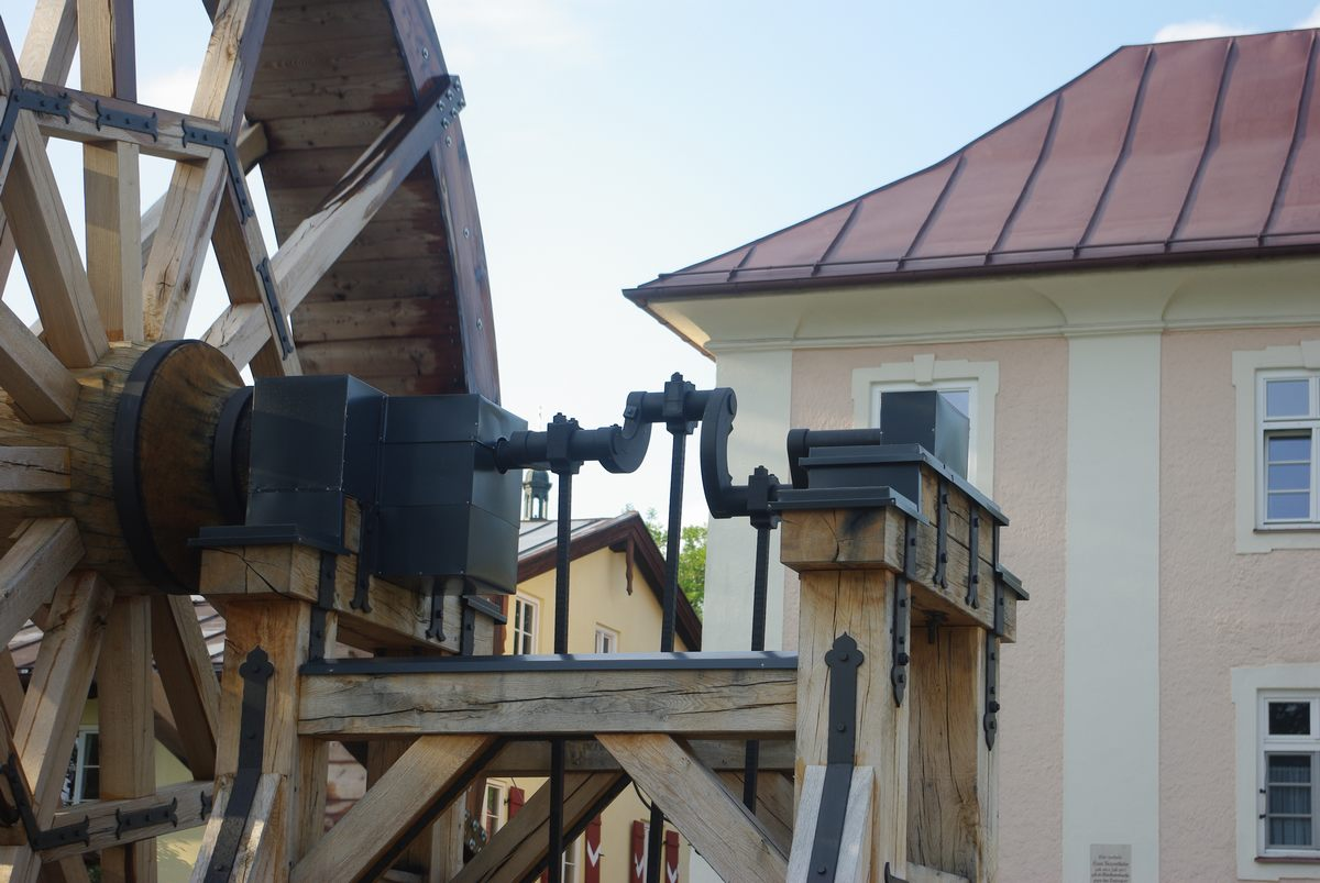 Nachbau einer Reiffenstuelschen Kolbendruckpumpe im Salinenpark Traunstein